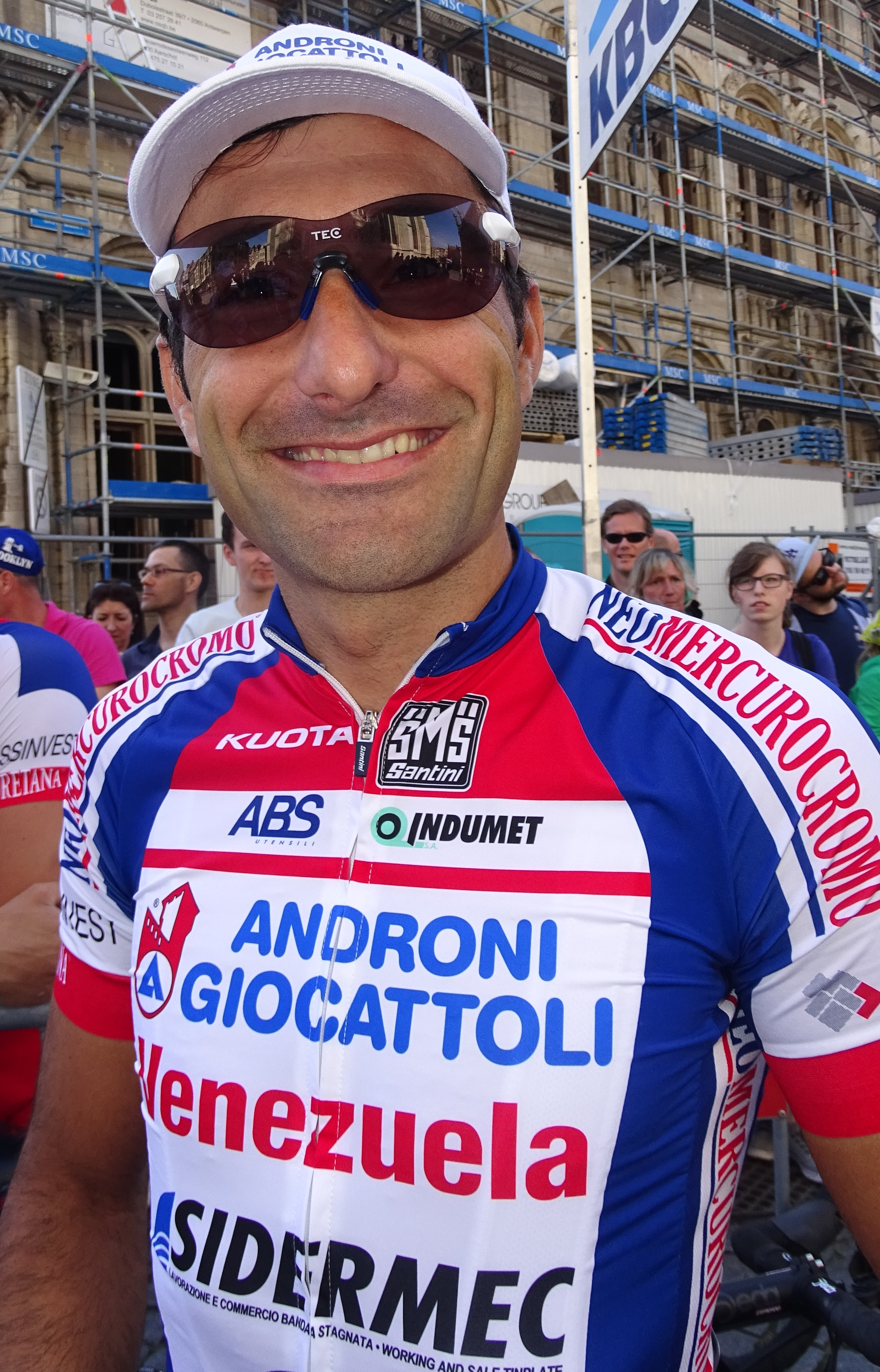 Reportage réalisé le mercredi 15 avril à l'occasion du départ de la Flèche brabançonne 2015 à Louvain, Belgique.